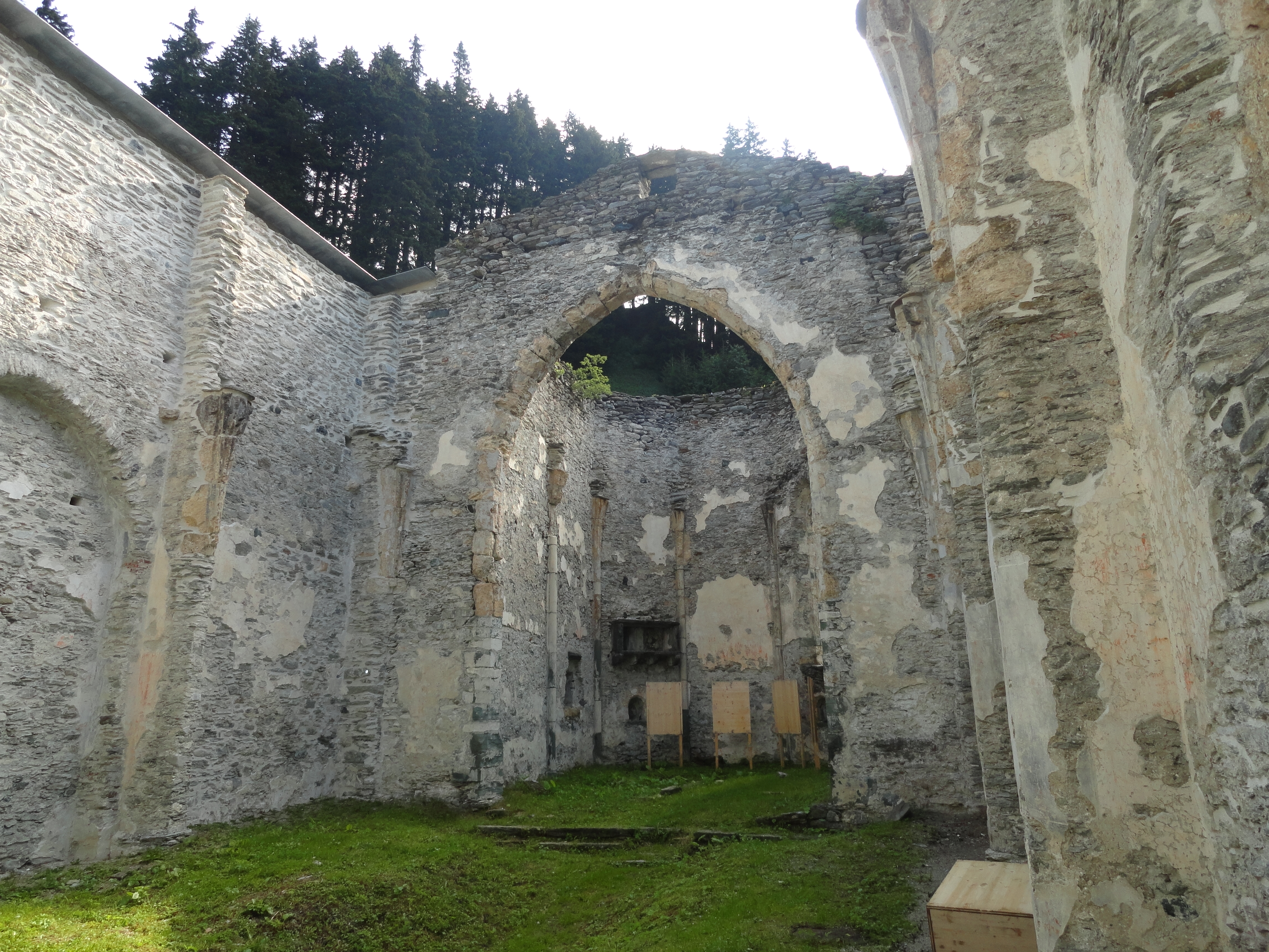 Kirchenruine San Gaudenzio in Casaccia, Blick zum Chor